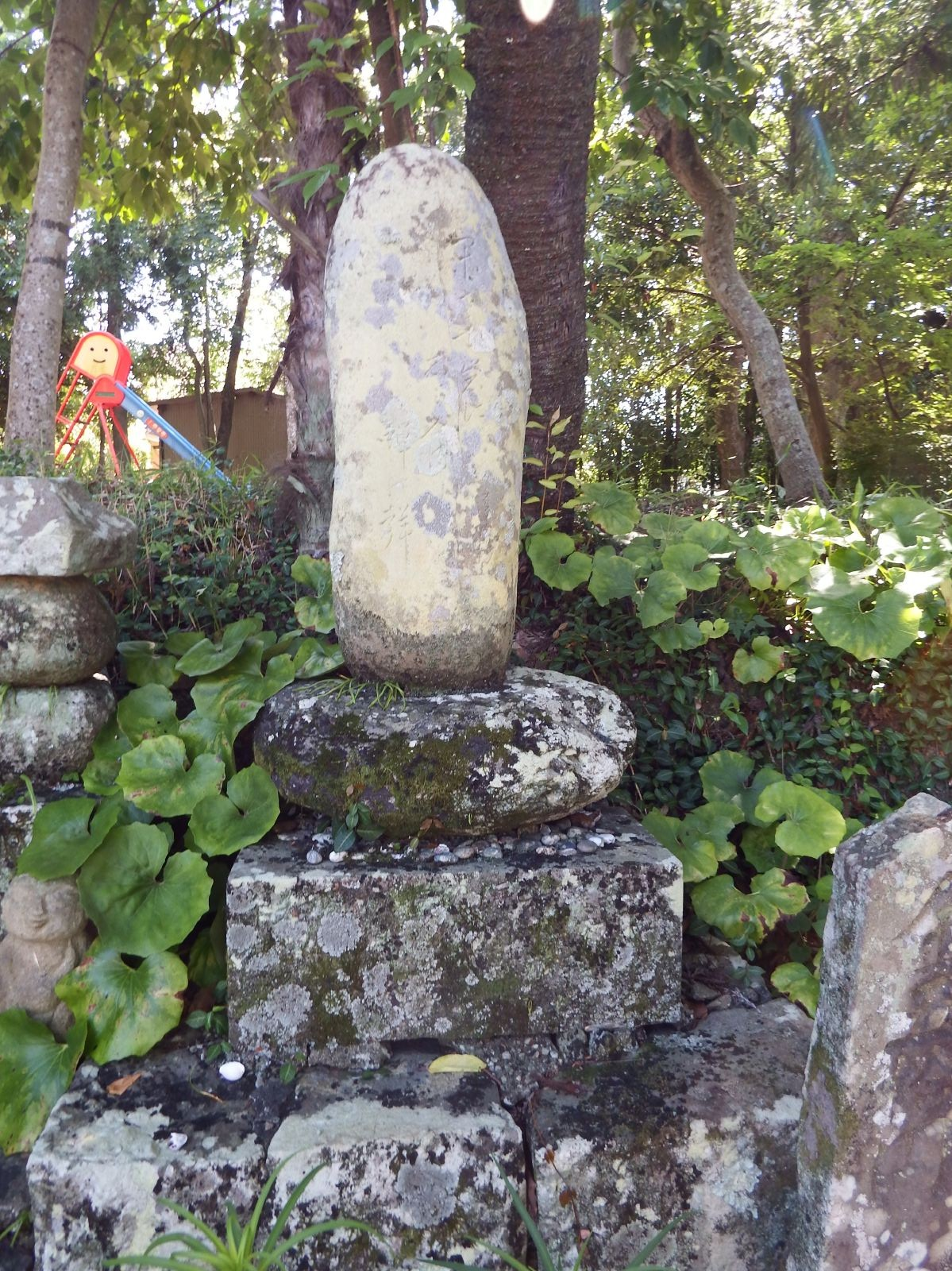 雪蹊寺の芭蕉の句碑